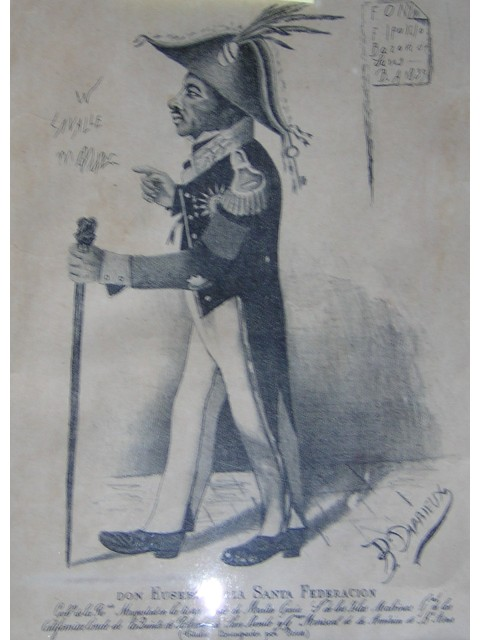 Nombre de la pieza: Caricatura de Eusebio de la Santa Federación. Impreso. Autor: B. Darrieux Fecha de ejecución: Siglo XIX Dimensiones: L: 42,5 cm / a: 37 cm con marco. Donación de Antonio Garcia al Complejo Museográfico Provincial 'Enrique Udaondo'.